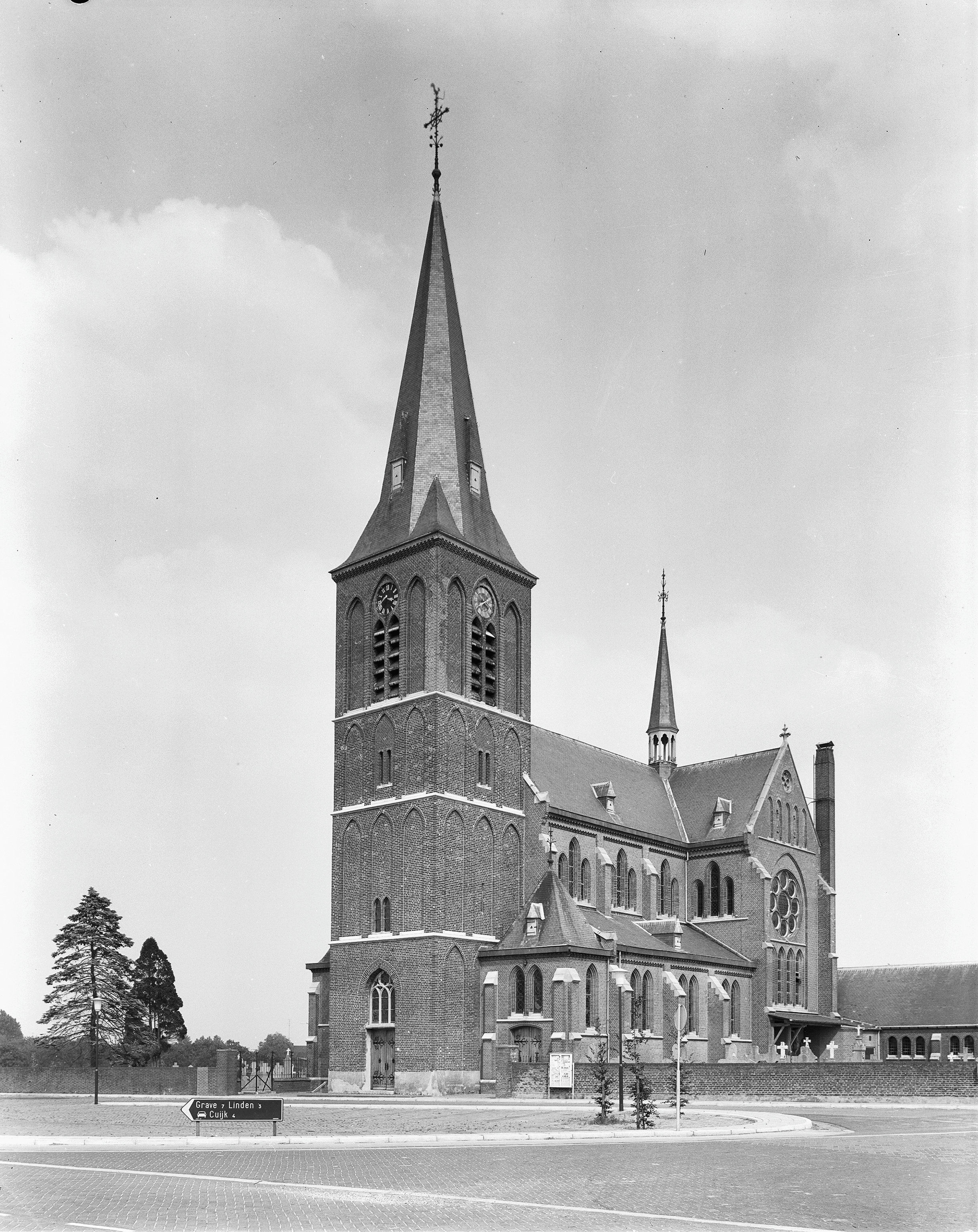 Sint Lambertus Kerk: zuid-west zijde